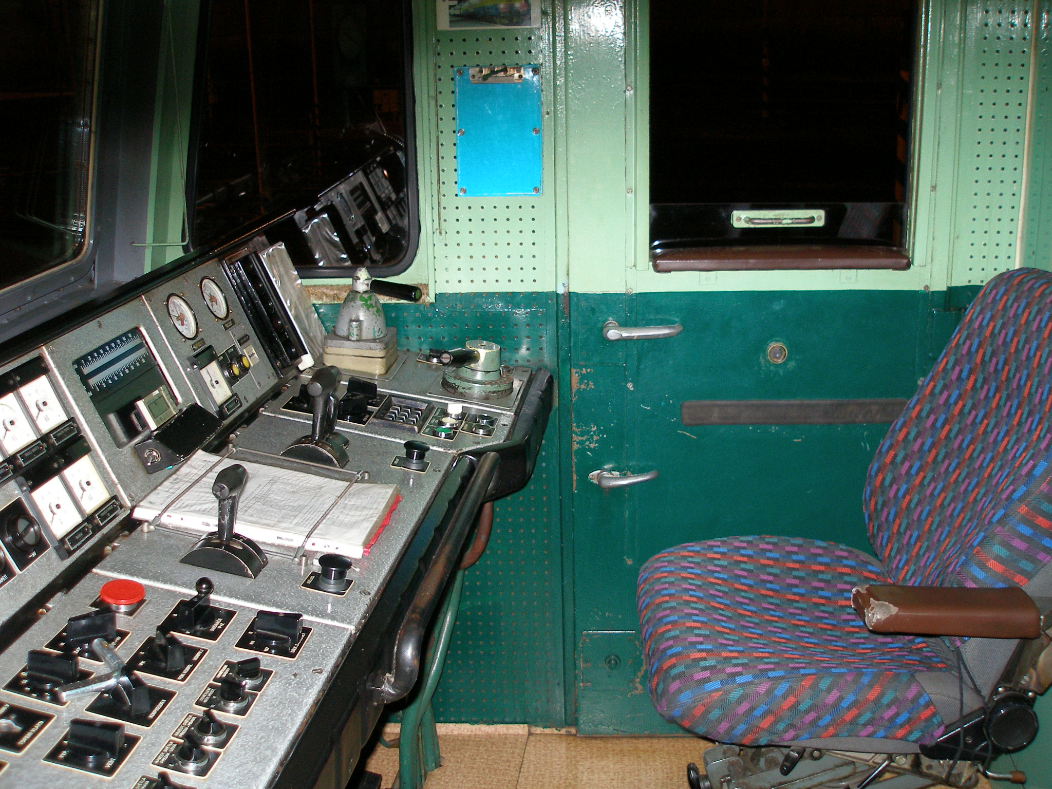 Lokomotiva rady 363 (363 061-3), DKV Plzen